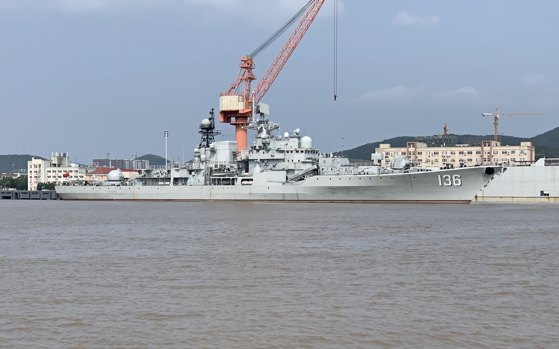 PLANS Hangzhou Destroyer